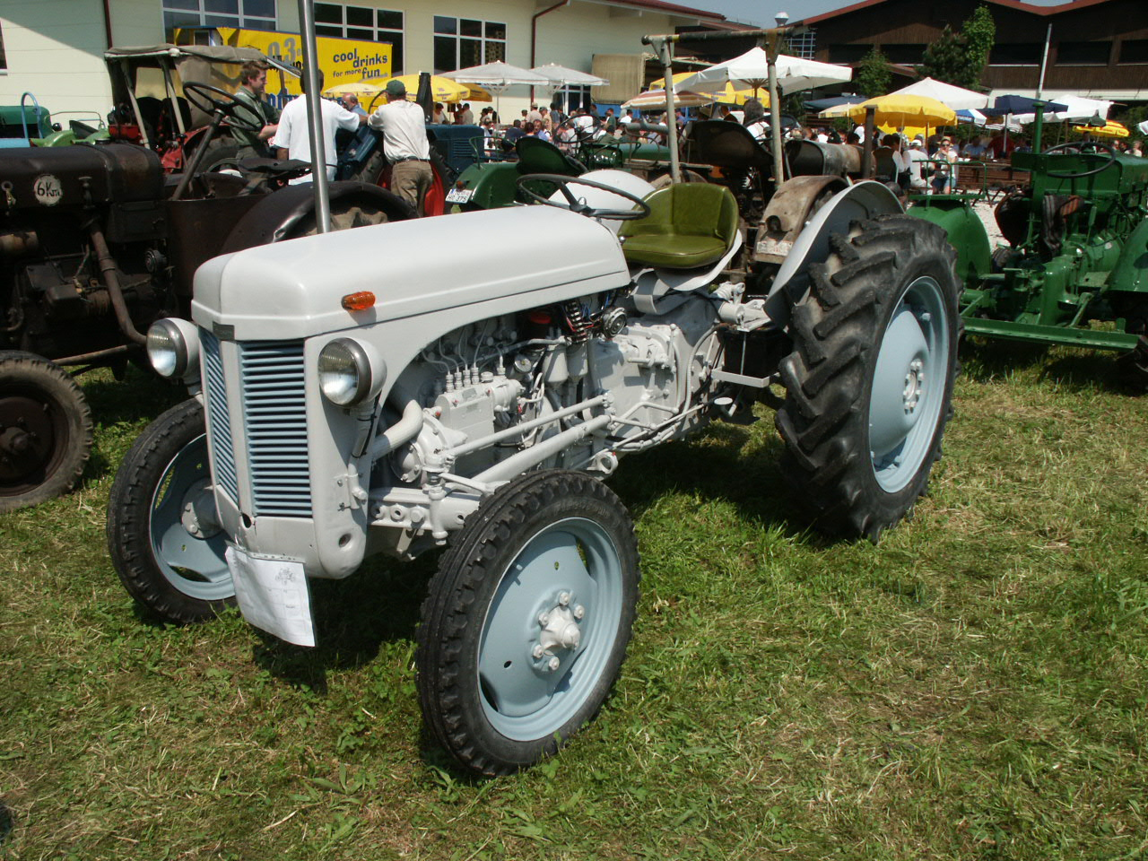 Ferguson TEF, 25 PS, Baujahr 1955